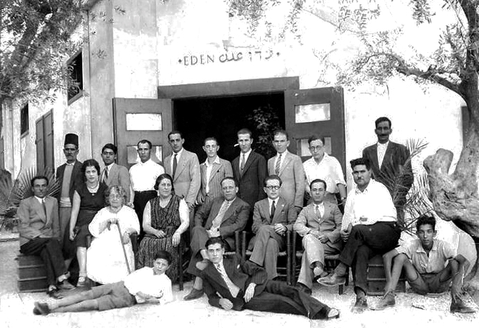 עובדי קולנוע עדן.